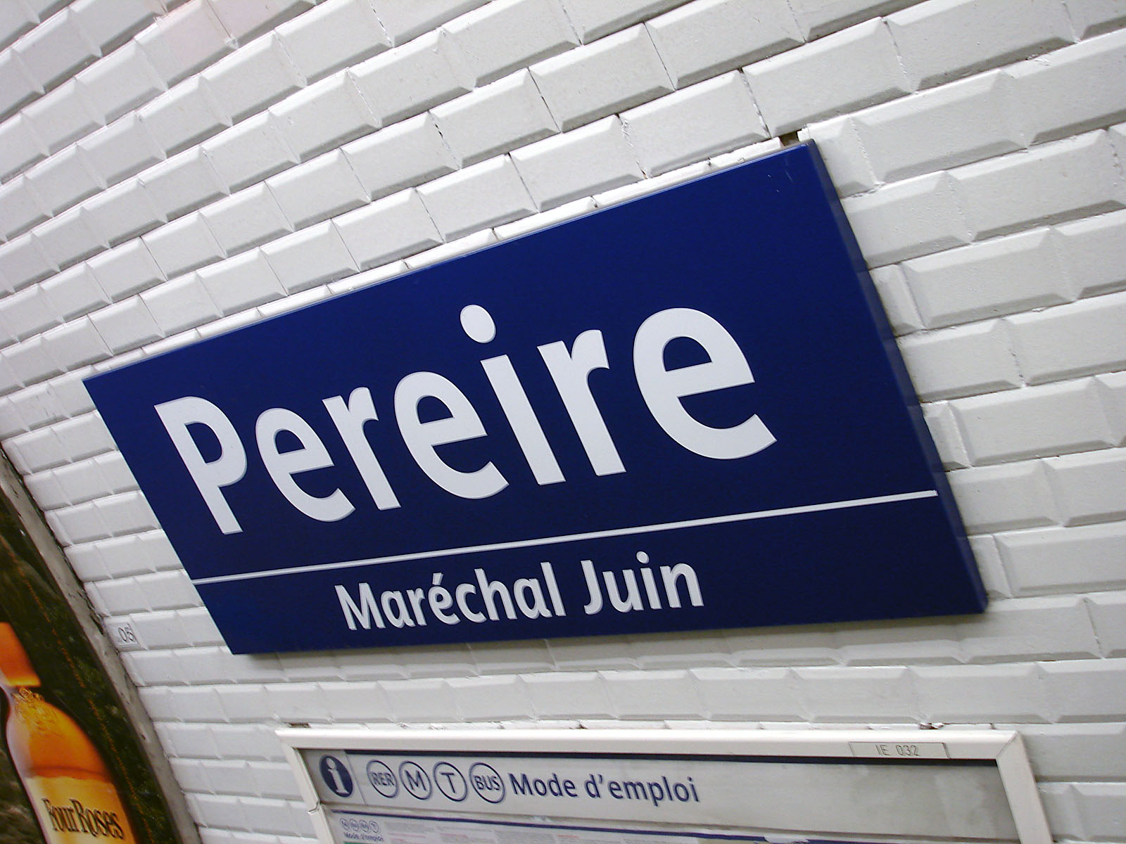 La station Pereire de la ligne 3 du métro de Paris, France.